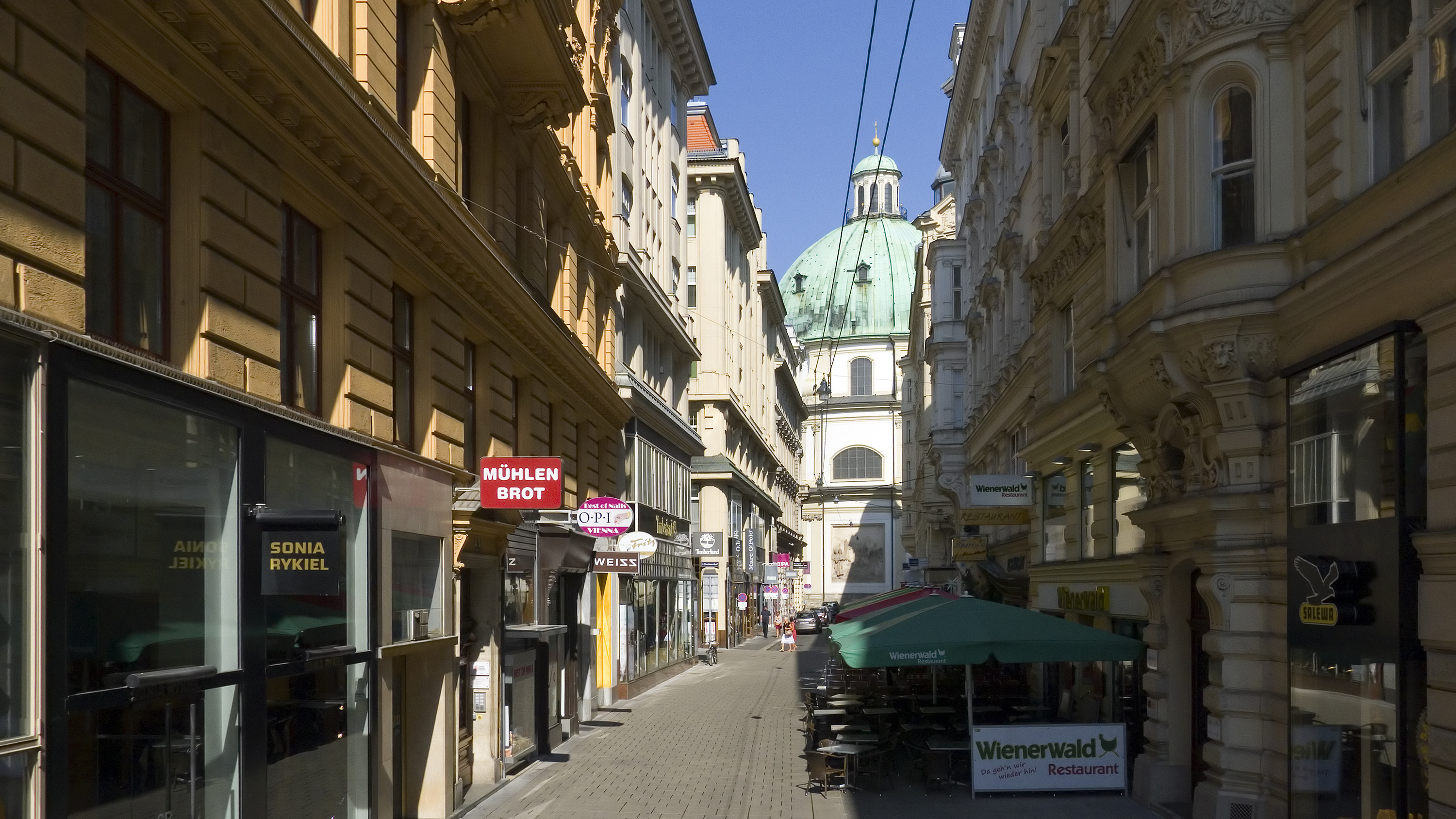 Goldschmiedgasse in Wien 1 bei Nr. 3 Richtung Nordwesten